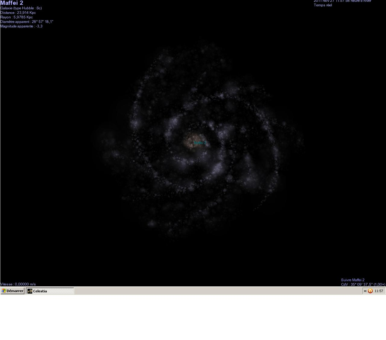 image de maffei 2